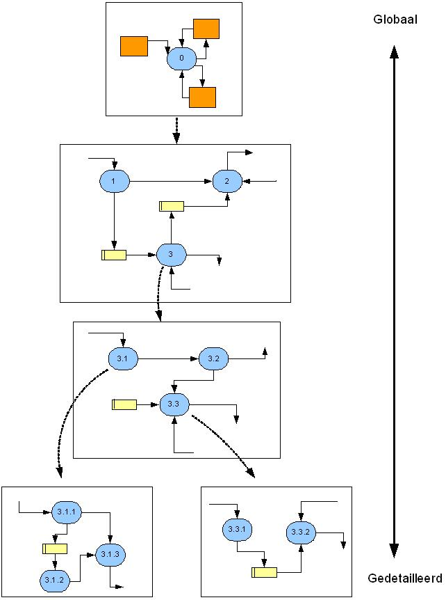 Data flow diagrams